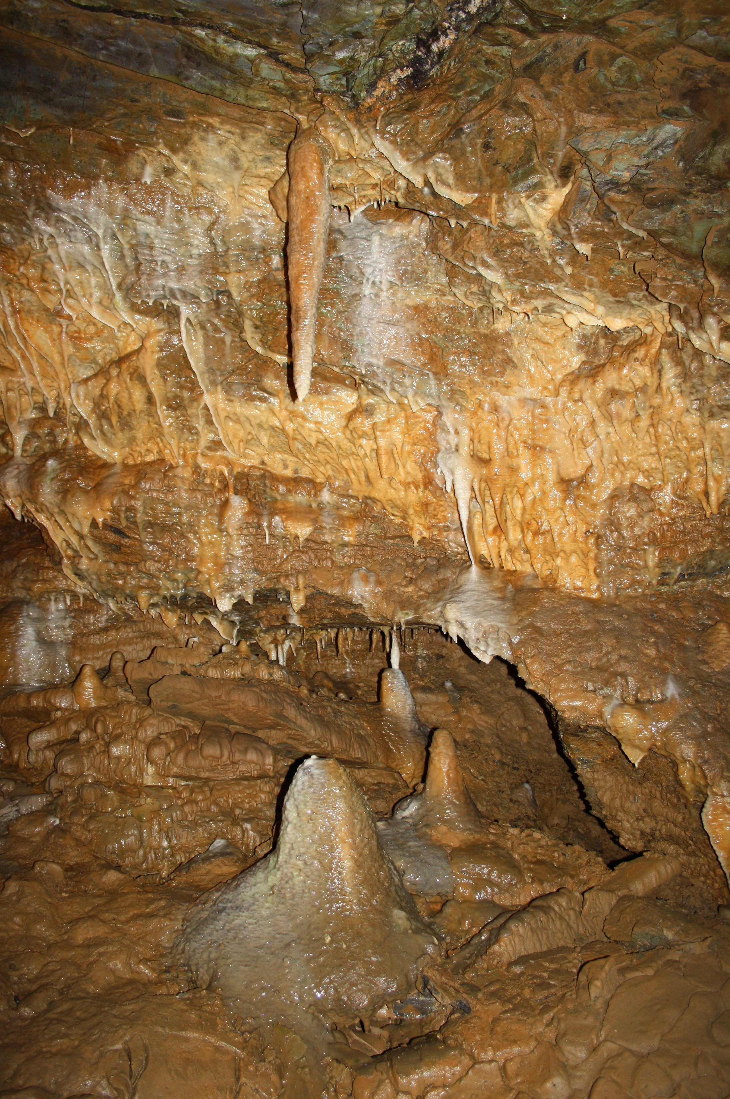 In der Drachenhöhle Syrau. Deutschland.